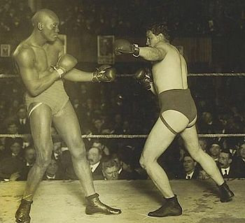 Match mellan Marvin Hart och Jack Johnson den 28 mars 1905 Kvalificering för VM-match om den efter James J. Jeffries vakanta titeln. Poängvinst för Hart efter tjugo ronder.